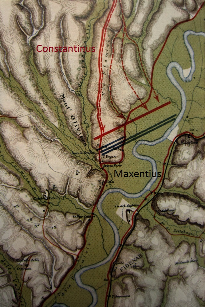 Nagy Konstantin Milvius-hídi csatájának rekonstruált rajza